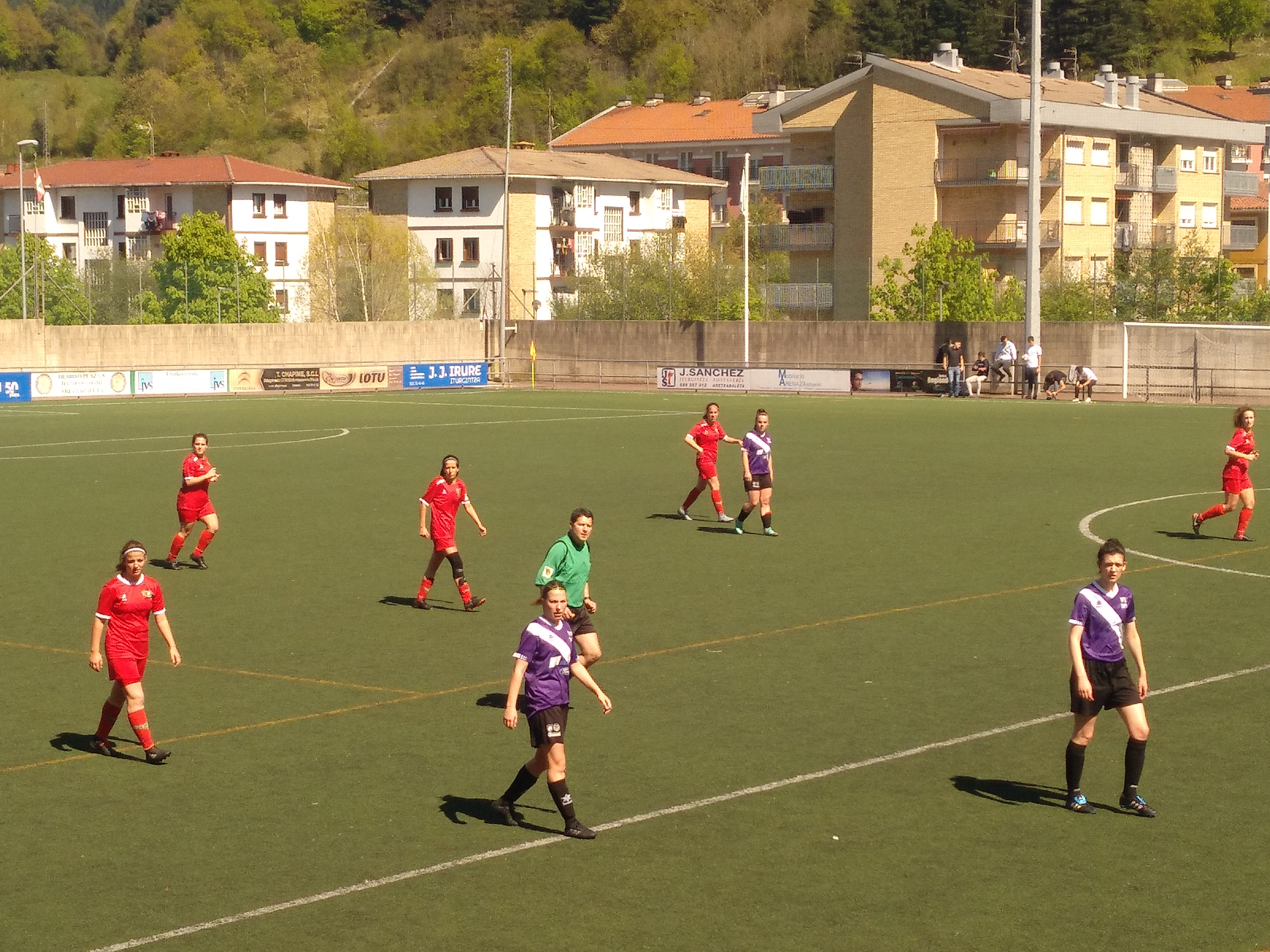 Leintz-Arizmendi eta Zumaiako FT-ren arteko nesken partida Aretxabaletan